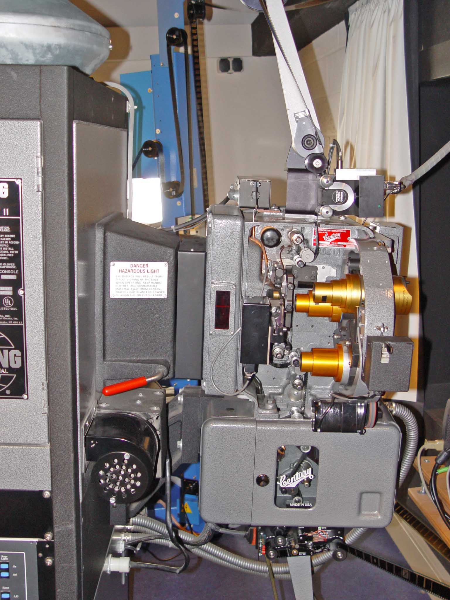 De Projekter am Kino Orion zu Ëlwen. Kategorie:Gemeng Ëlwen Kategorie:Lëtzebuerger Kinoen